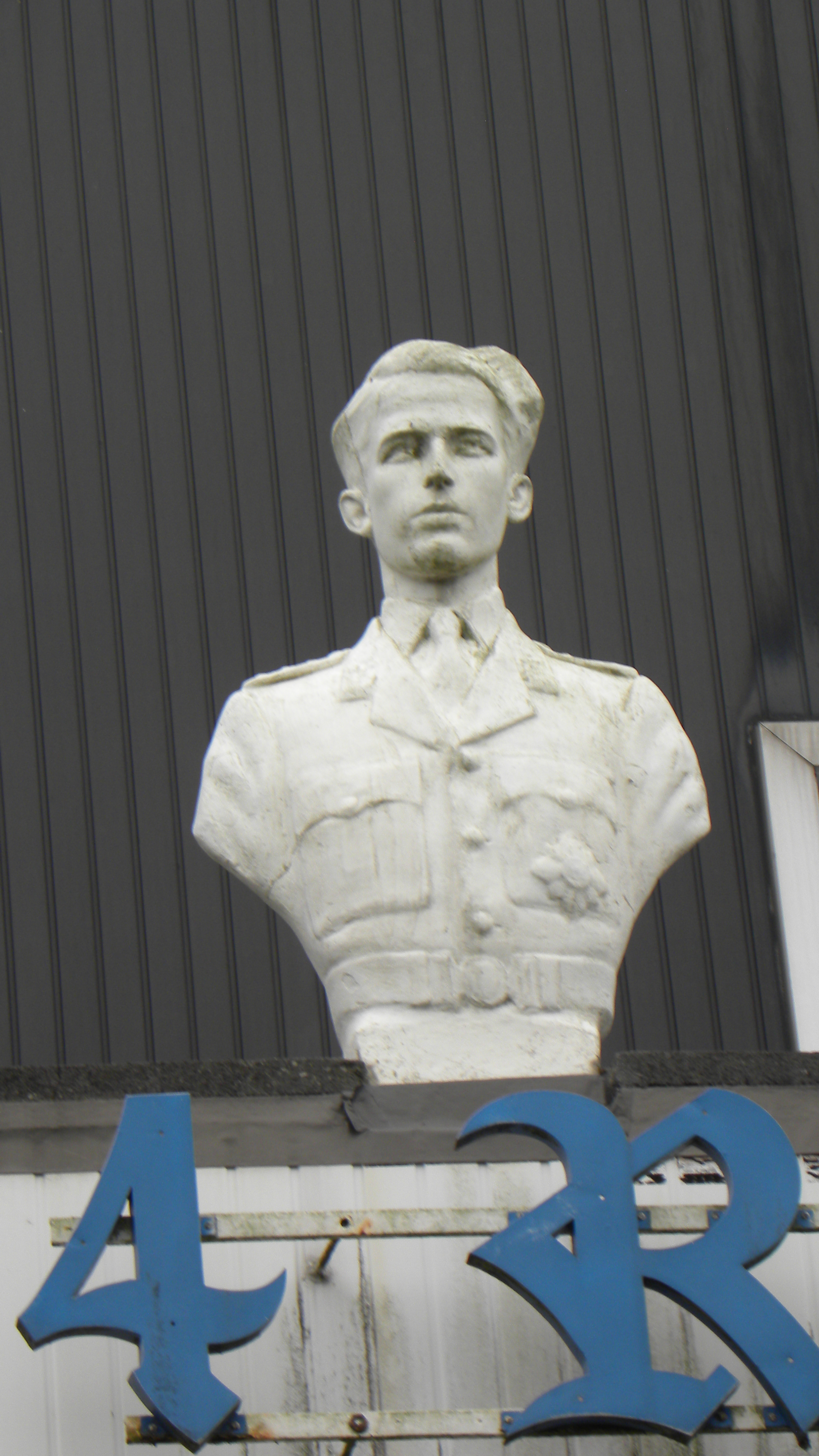 Restaurant "Les 4 rois" à Tombeek (Overijse) carrefour de la Lanestraat avec route Nationale 4 (Belgique). buste du 5eme jeune roi : Baudouin